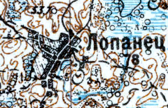 Топографическая карта Ленинградской области, квадрат VIc-28 (Луга), деревня Лопанец